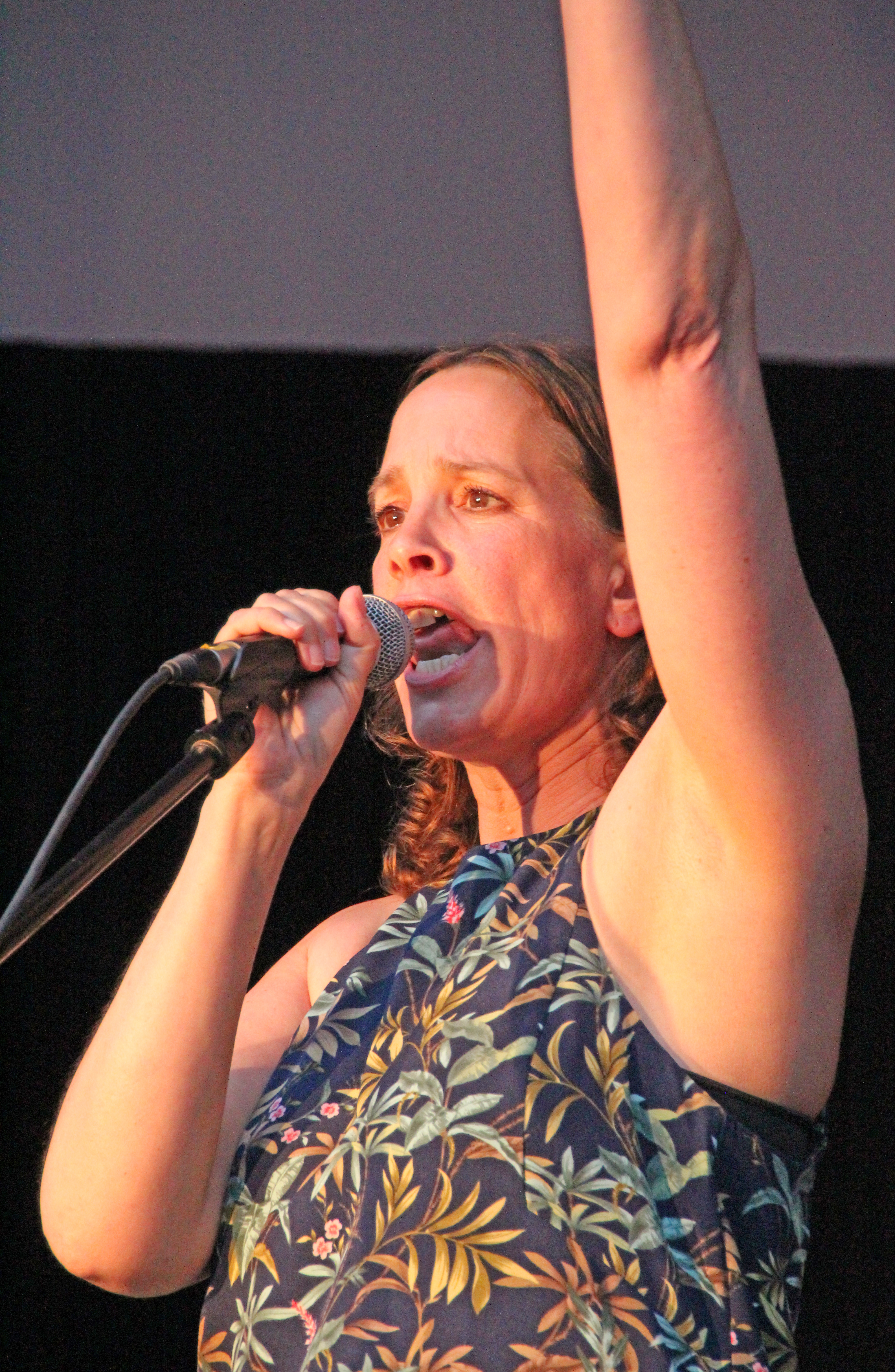 Bildinhalt: Elke Brauweiler, deutsche Sängerin, bei einem Auftritt auf dem Saarbrücker Altstadtfest Aufnahmeort: Saarbrücken, Deutschland Die dargestellte Person wurde bei einem öffentlichen Auftritt fotografiert.